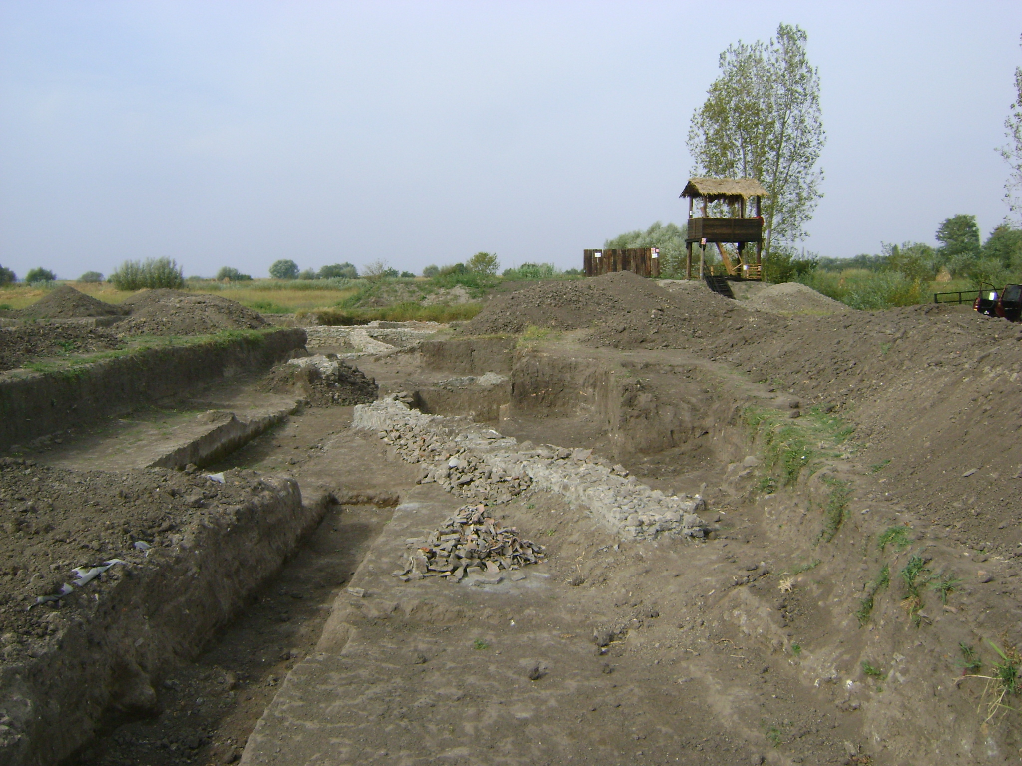 Situl arheologic de la Cioroiul Nou